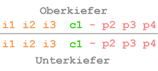 Zahnformel vom Hundwelpen eigene Darstellung, GNU-FDL, --Uwe Gille 16:54, 25. Nov 2004 (CET)